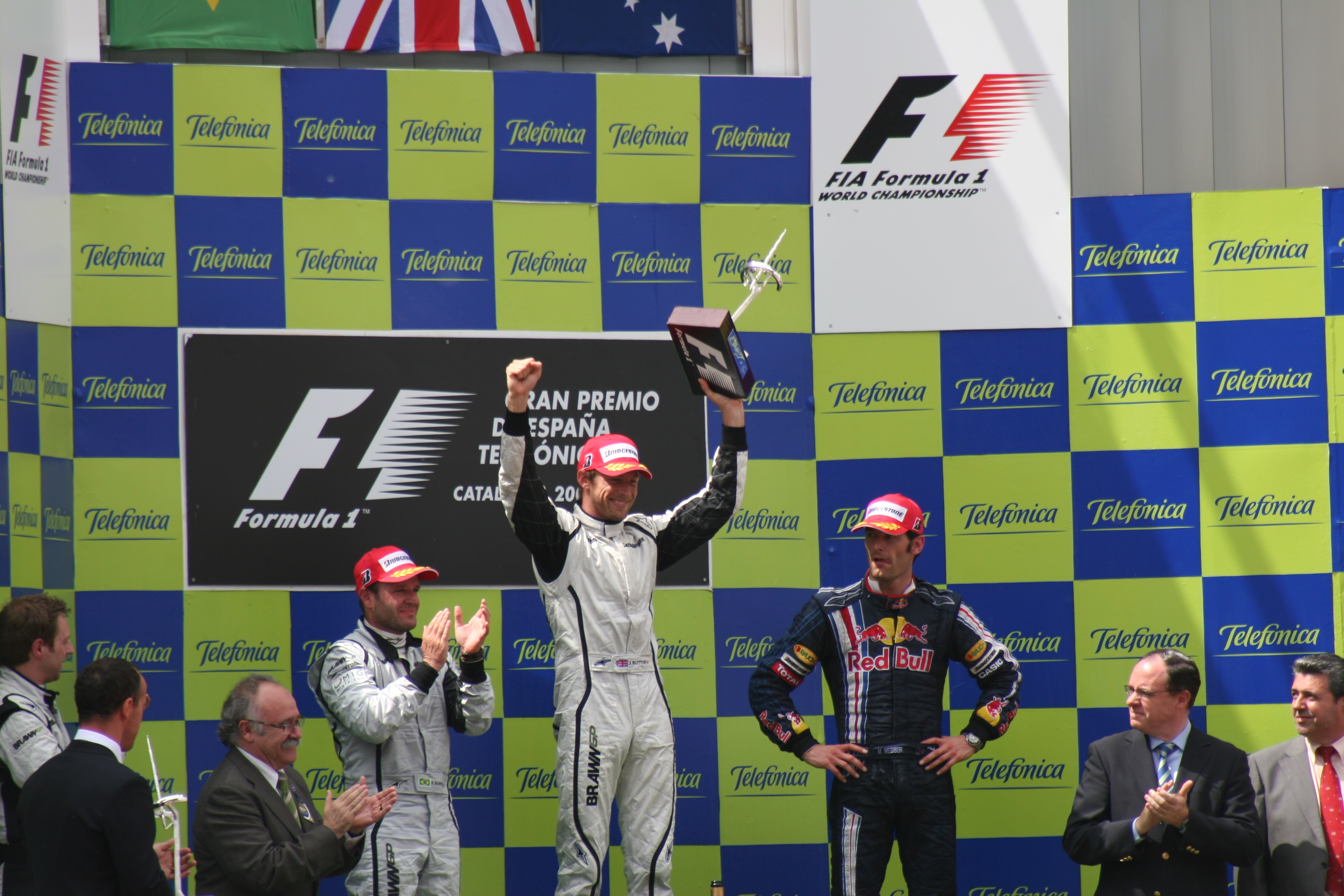 Jense celebrates